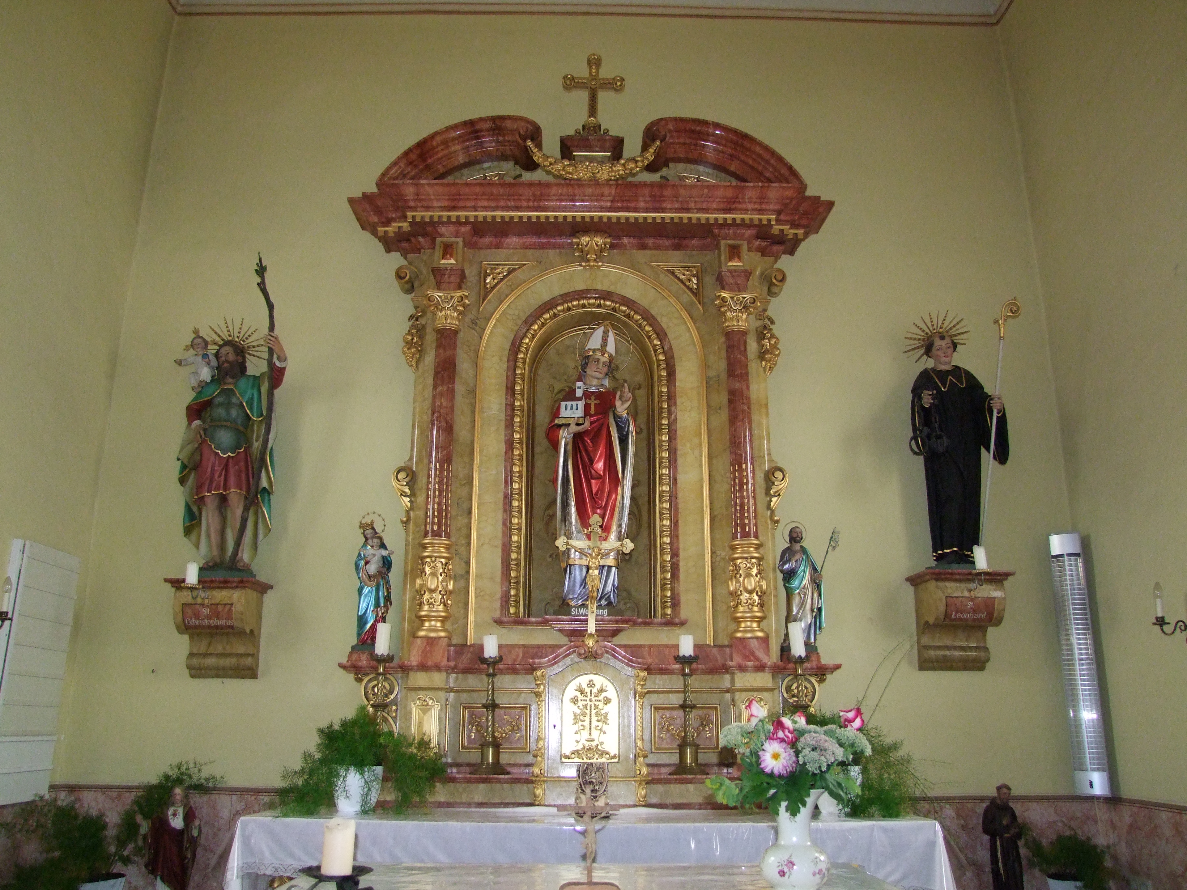 Die Kapelle zur St. Wolfgang in Schöneschch, einem Ortsteil von Bad Wörishofen in Schwaben